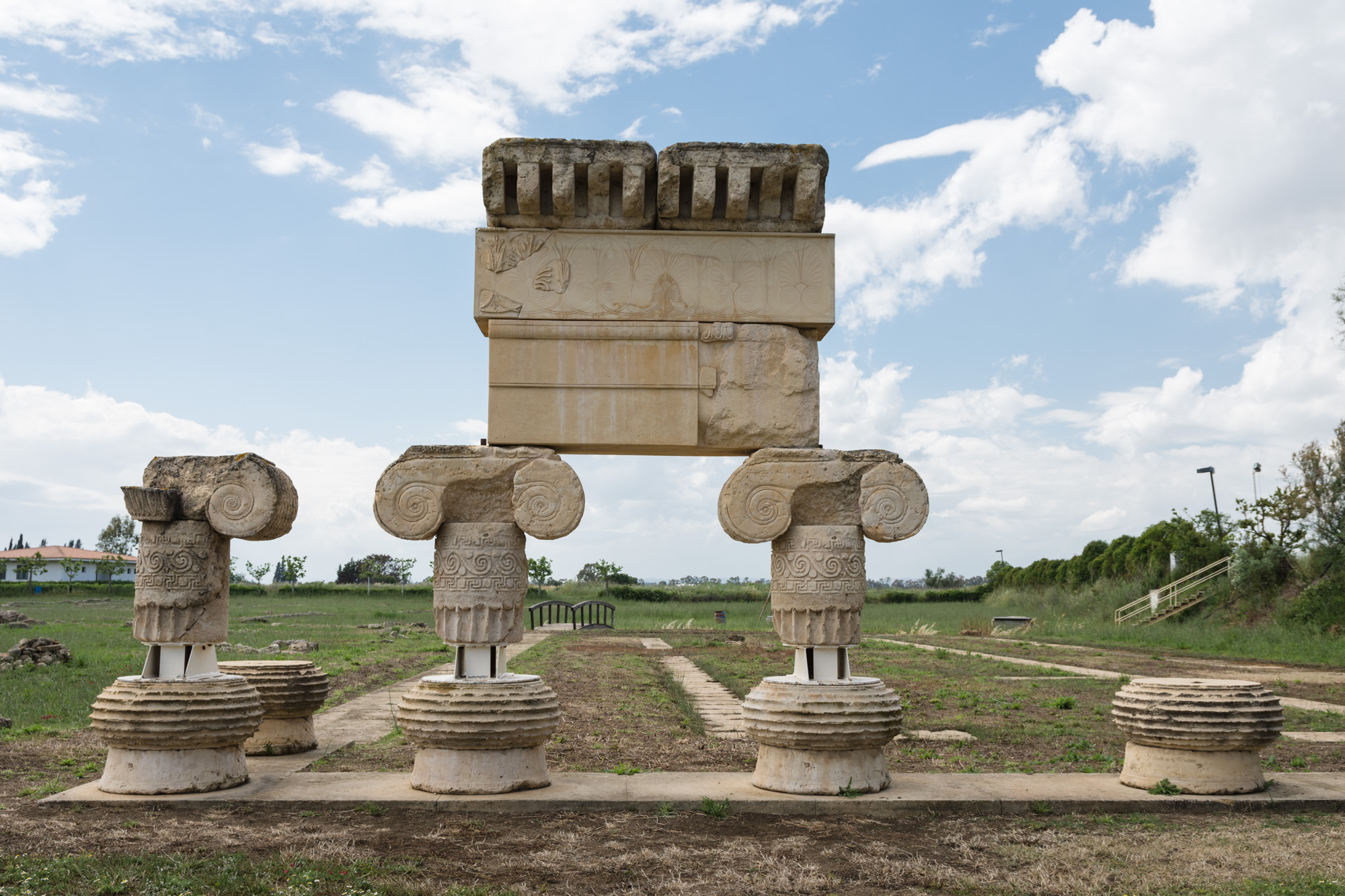 Museo Archeologico Nazionale di Metaponto This is a photo of a monument which is part of cultural heritage of Italy.